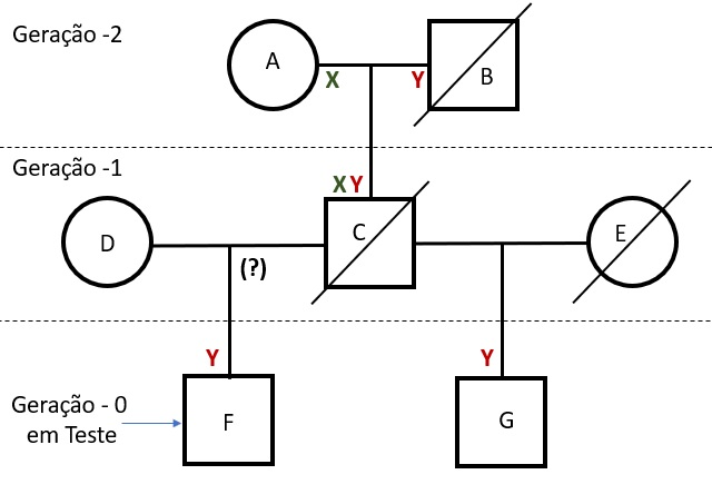 Árvore genealógica de dois meios irmãos onde se verifica a herança genética do cromossoma Y e do Cromossoma X